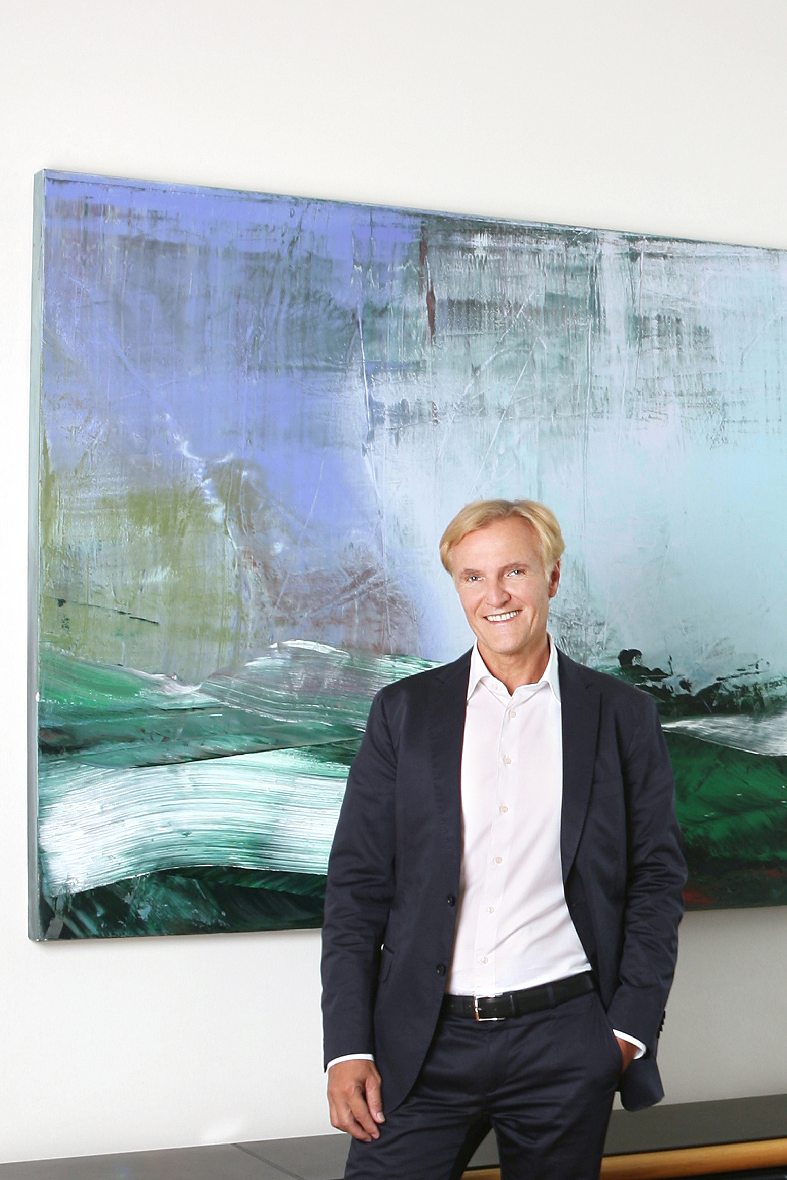 Klaus Albrecht Schröder (2012)